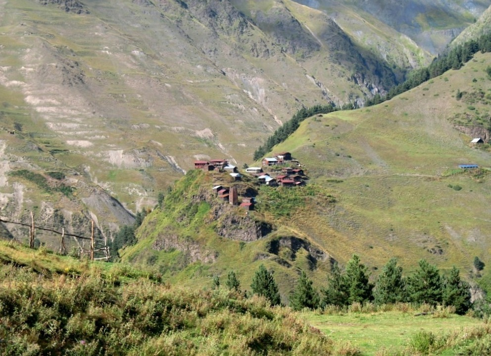 Tusheti